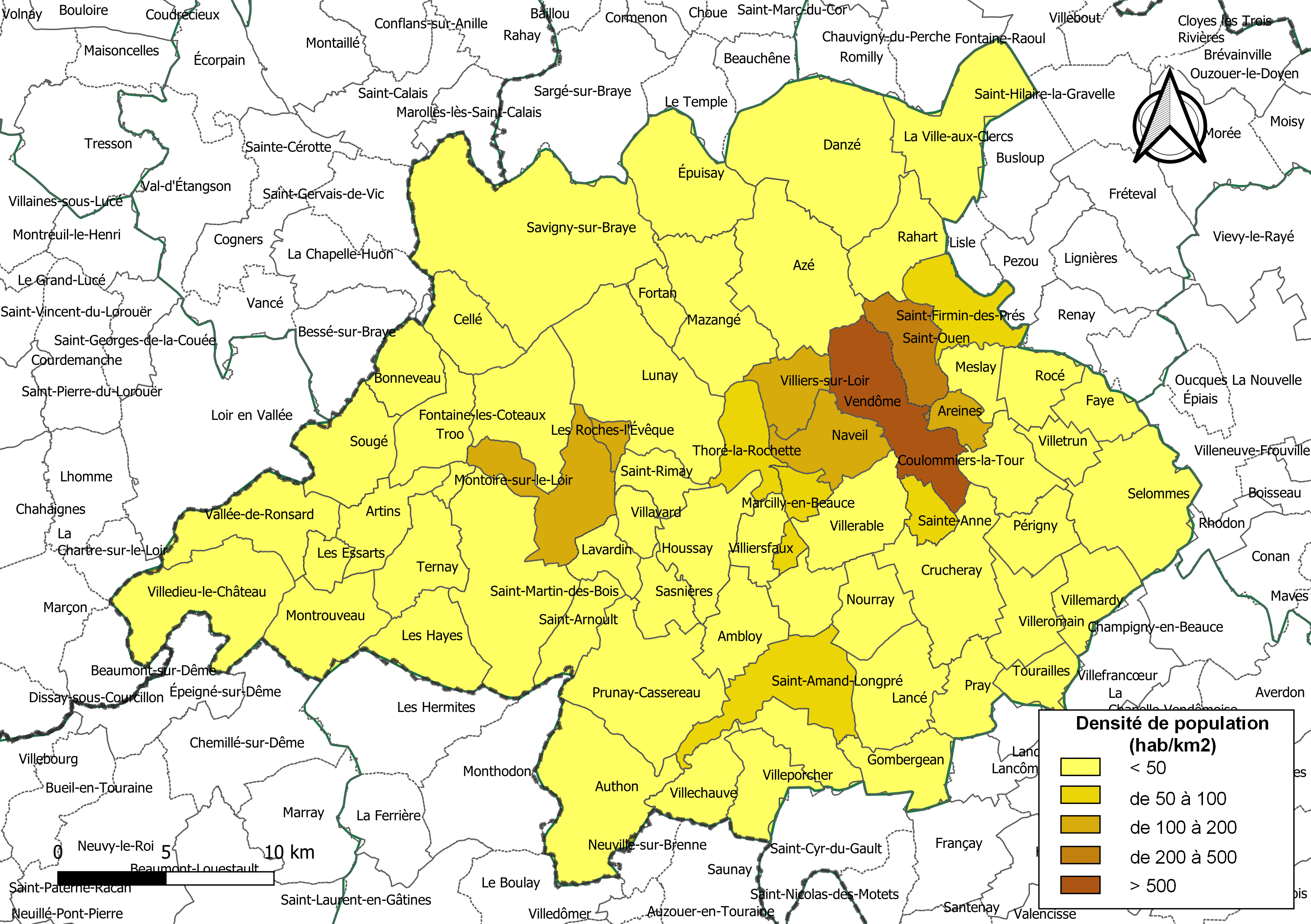 Carte des densités de population (millésimée 2016) des communes de la communauté de communes la Communauté d'agglomération Territoires Vendômois, département de Loir-et-Cher, France. Composition au 1er janvier 2019.